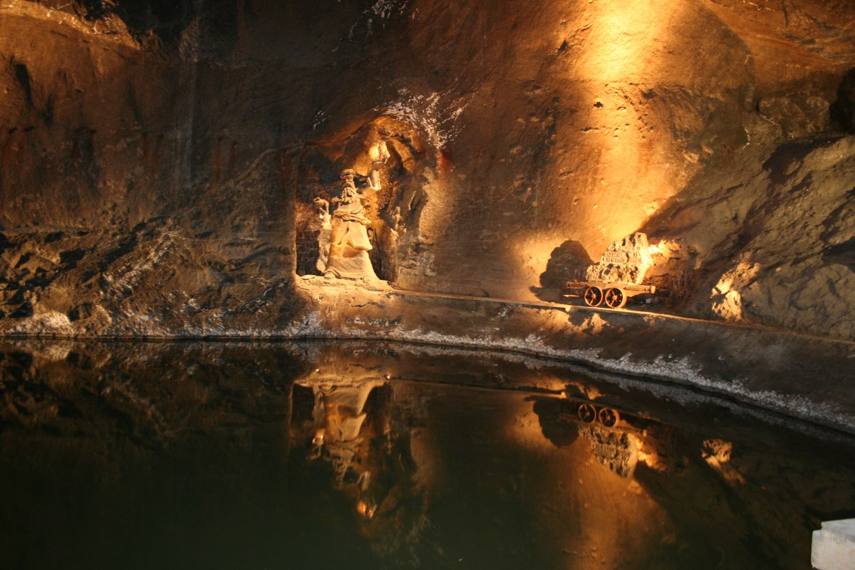 Kopalnia Soli w Wieliczce - komora Weimar. Autor: Marek Czerwiński